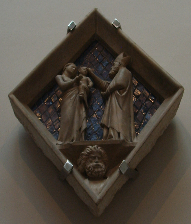 Losanga 26, cresima, maso di banco, 1337-1341